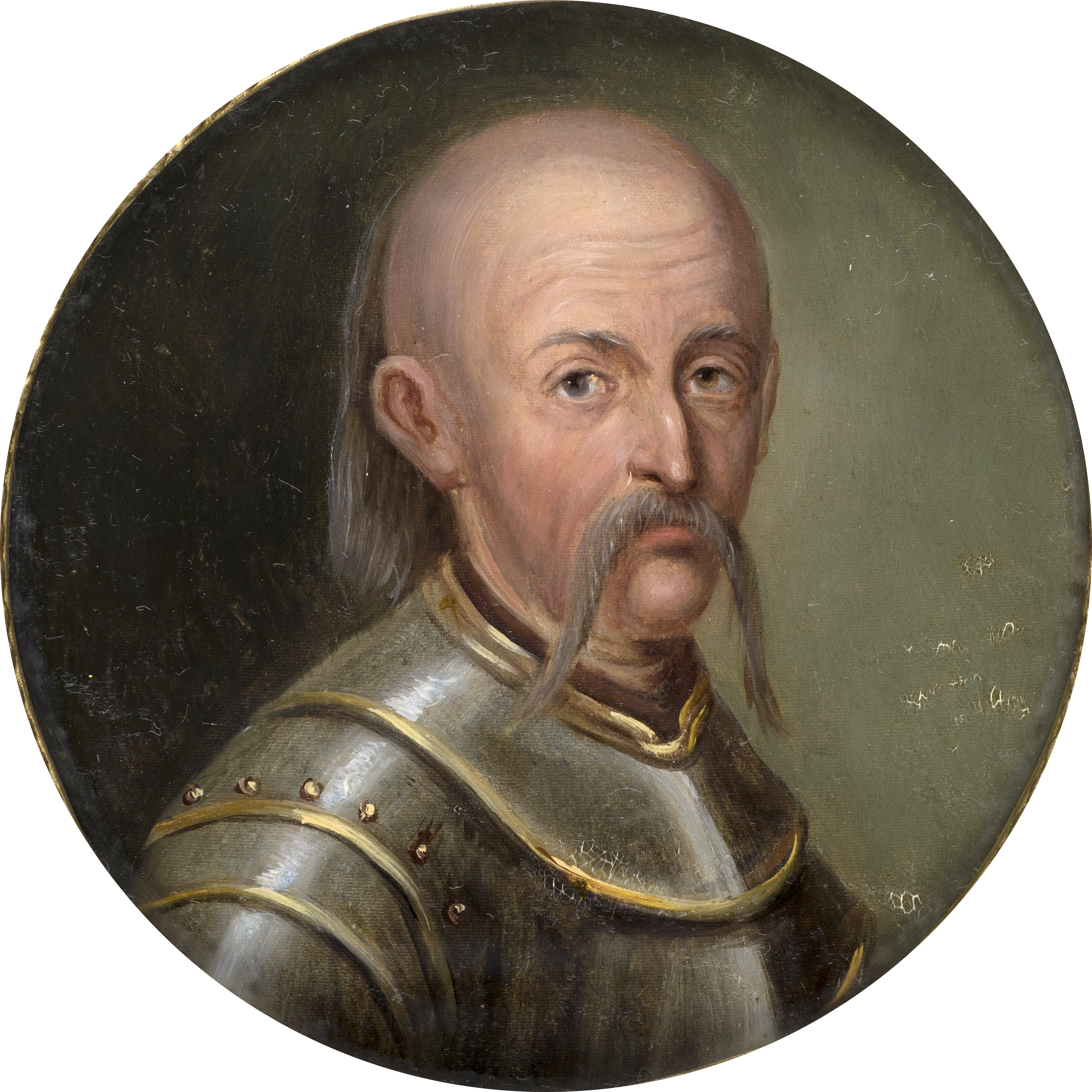 Беларуская (тарашкевіца): Партрэт Паўла Яна Сапегі (Pavał Jan Sapieha)